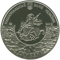 1800 років м. Судаку аверс